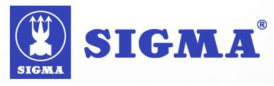 Logo SIGMA GROUP a.s.